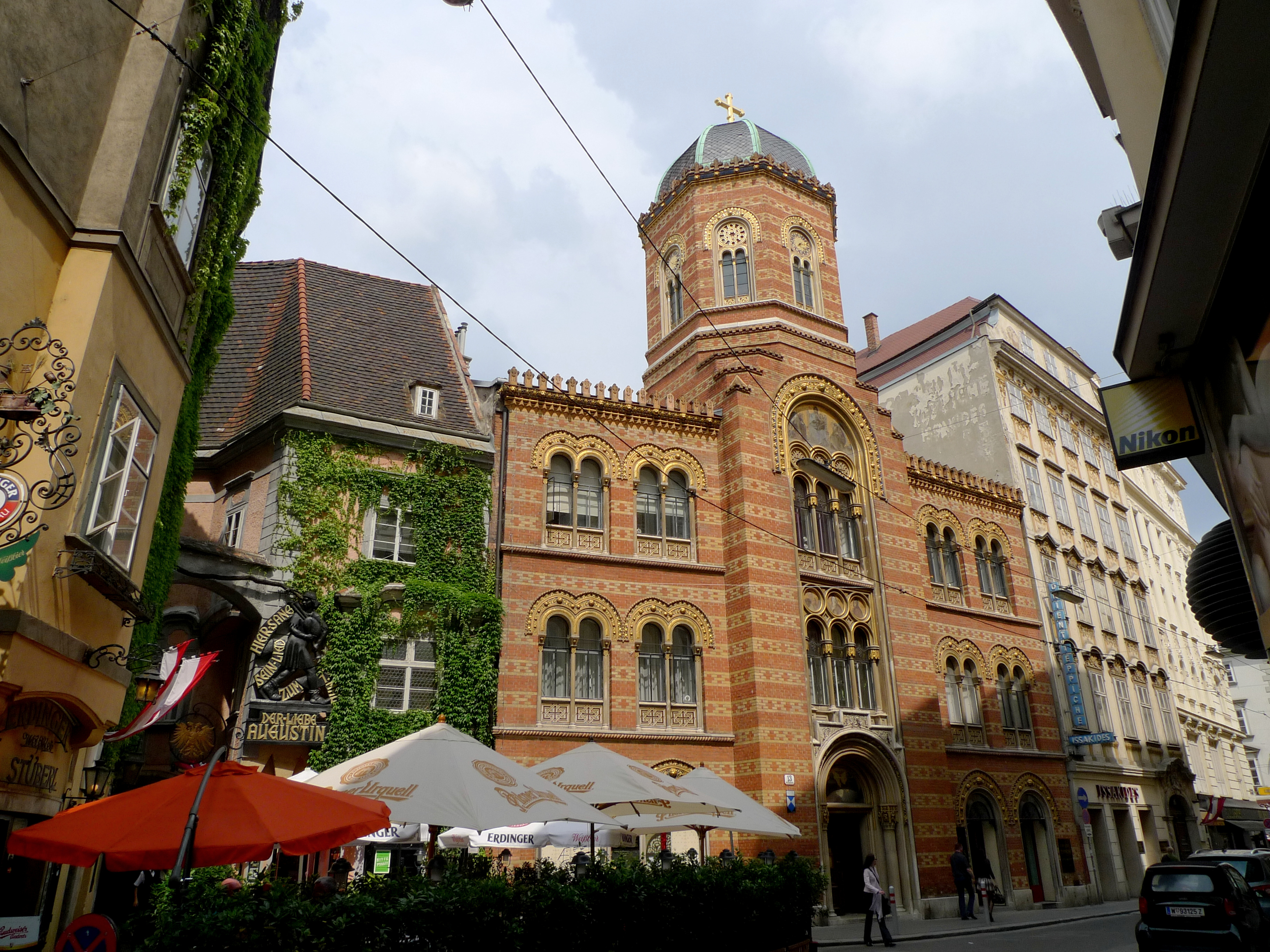 Griech.-orient. (orth.,nichtun.) Kirche Hl. Dreifaltigkeit m.Pfarr- u.Schulhaus